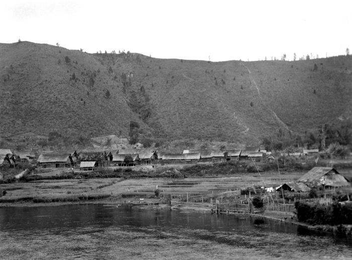 Negatief. Gezicht op Peusangan aan de gelijknamige rivier